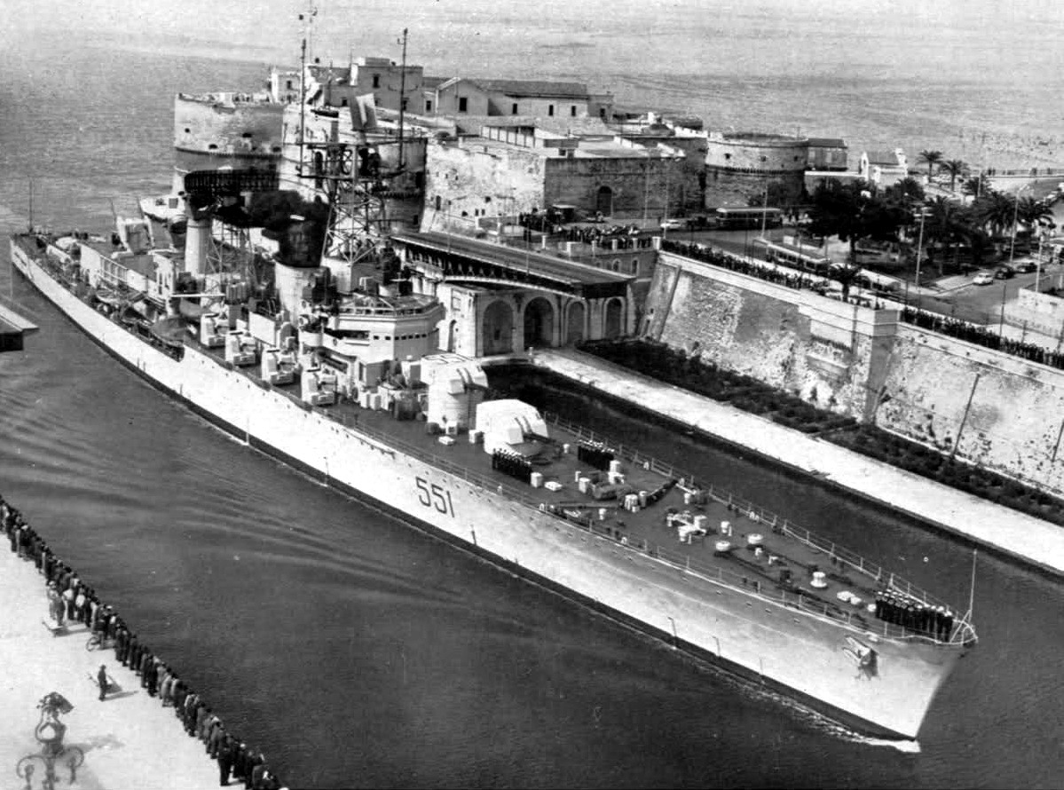 Lìincrociatore Garibaldi a Taranto mentre attraversa il canale navigabile